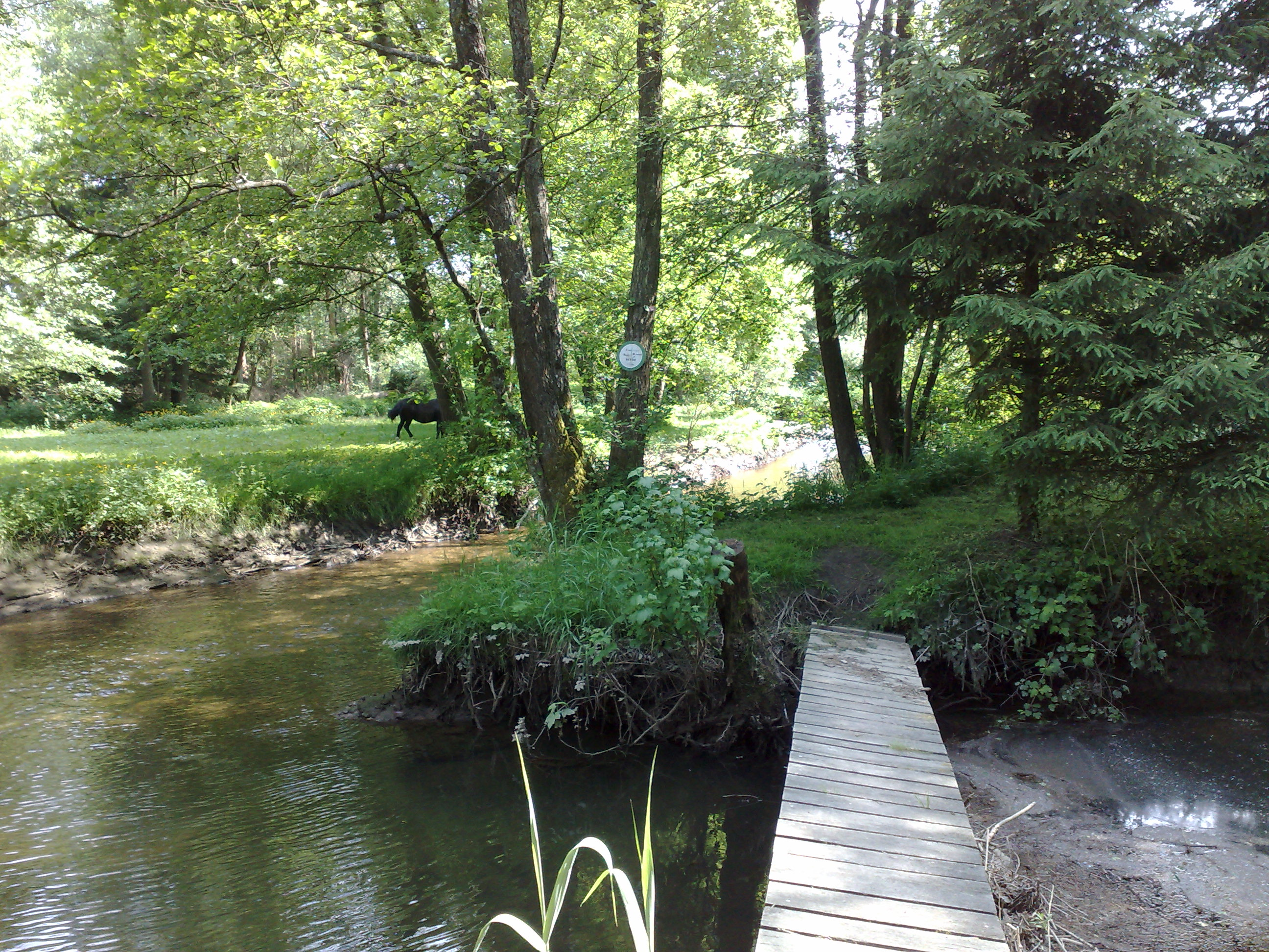 Zusammenfluß von roter und weißer Saar, im Bild links die rote, rechts die weiße Saar